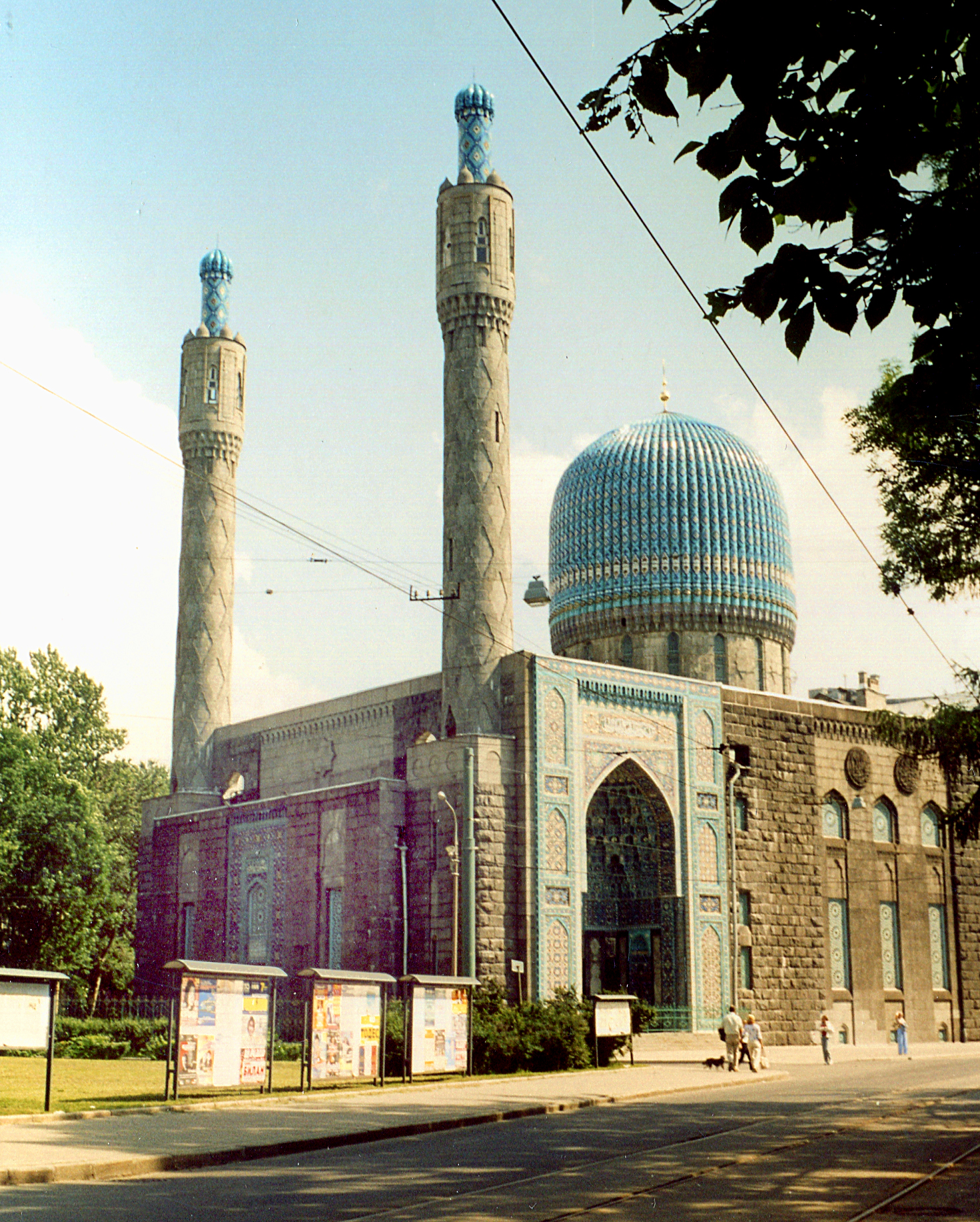 Соборная мечеть в Петербурге.